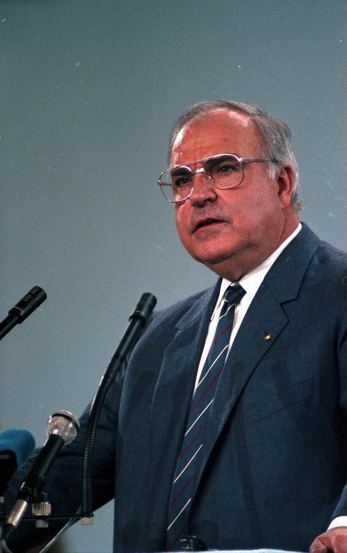 34. Bundesparteitag der CDU in der Rheingoldhalle, Mainz (6.-8.10.1986). 7.-8. Oktober 1986